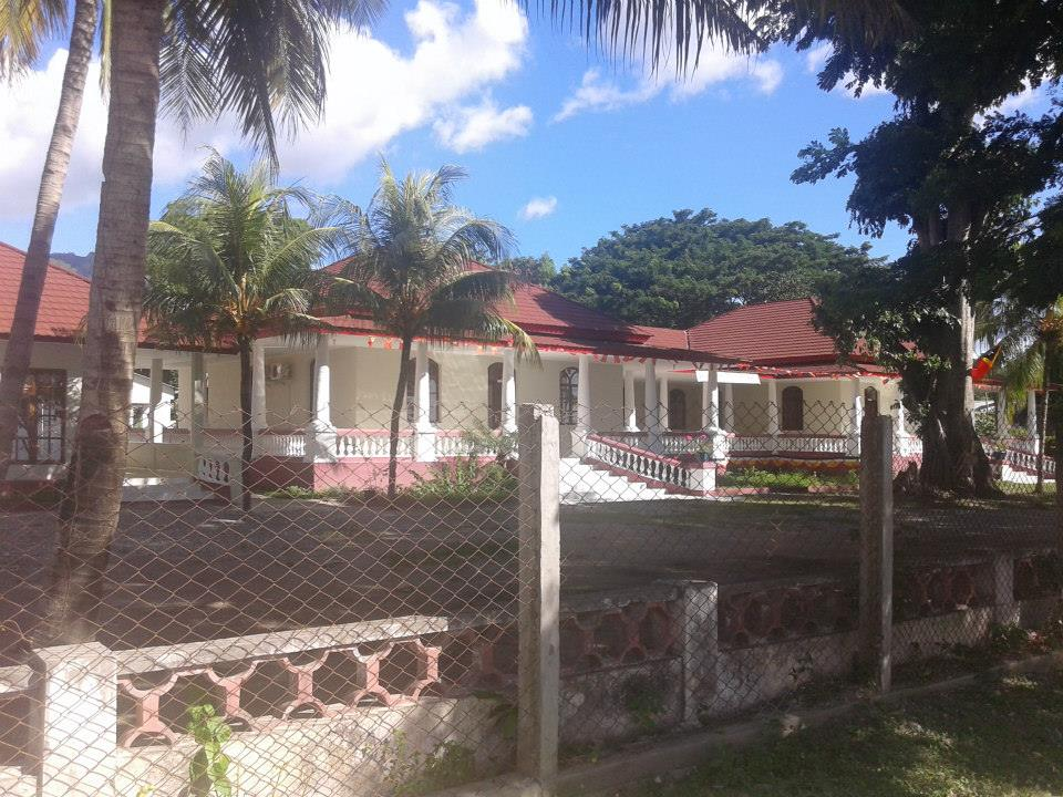 Oecusse